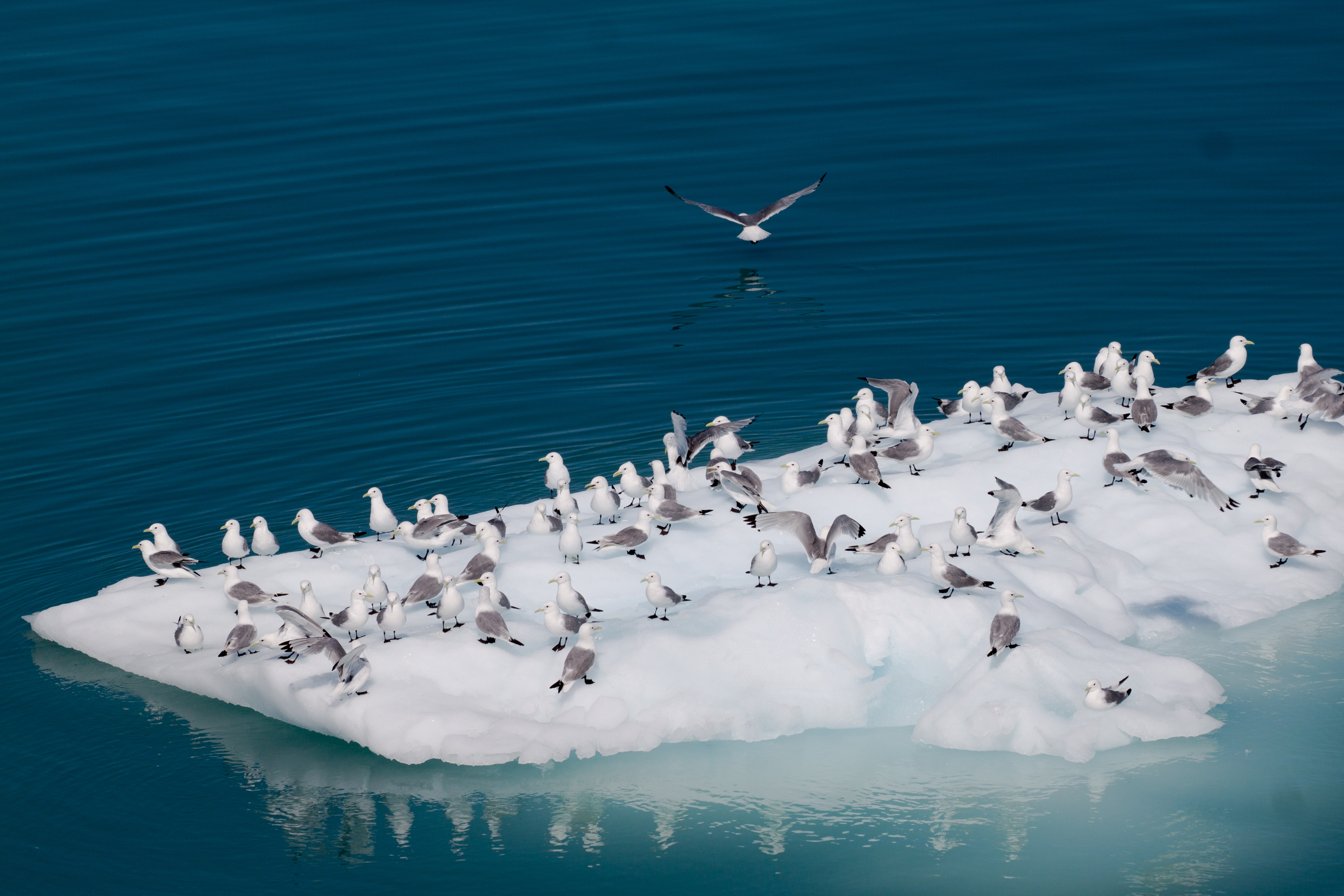 Glacier Bay